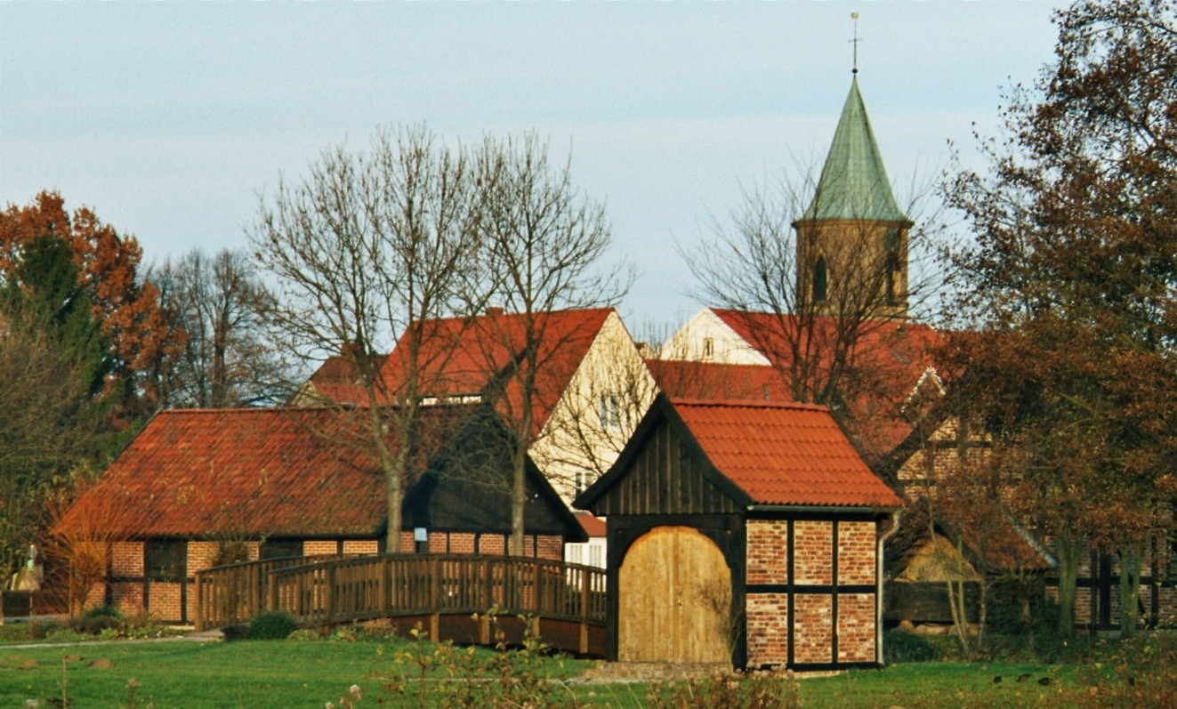 Mühlenensemble Venne